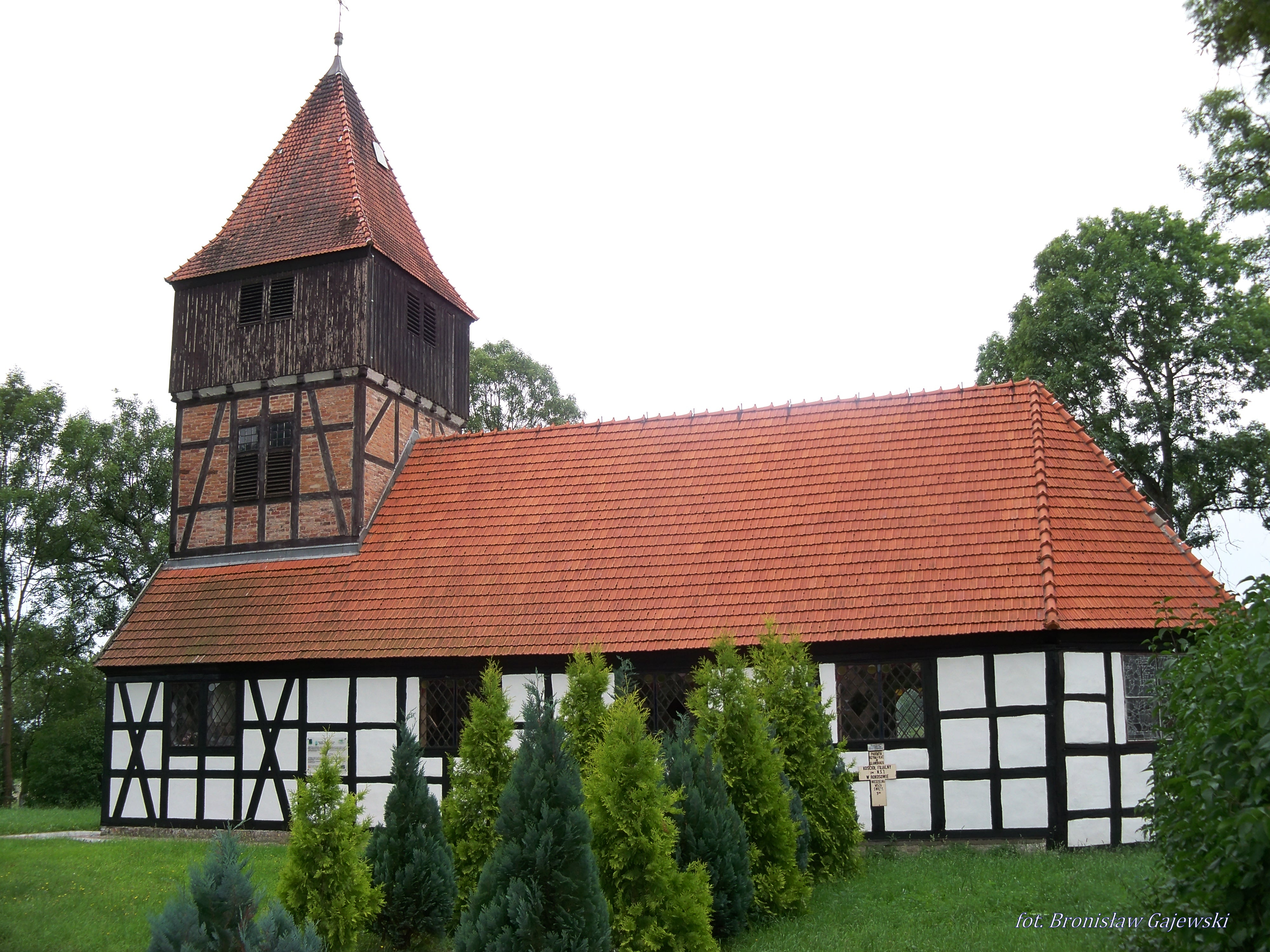 Rokosowo - dawny kościół ewangelicki, obecnie cerkiew greckokatolicka p.w. Najświętszego Serca Pana Jezusa.